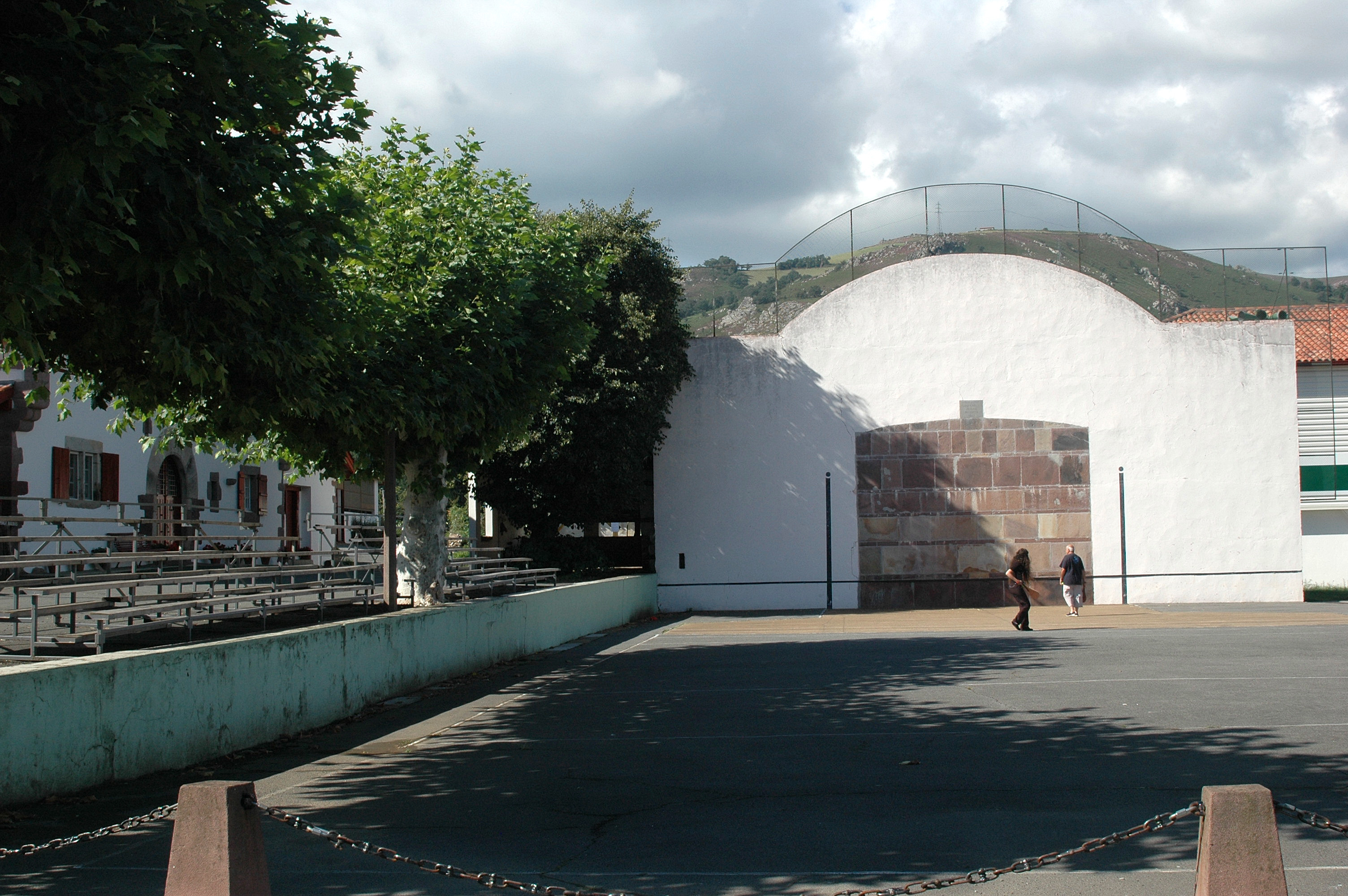 Saint-Martin d'Arrossa, le fronton. Photo prise le 03/08/06 par Harrieta171